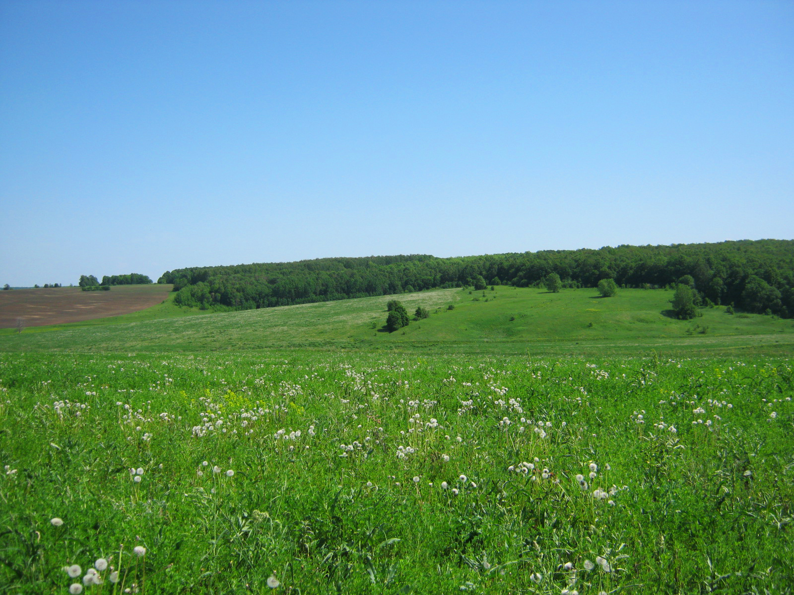 Дубрава около с. Тарталей, Бутурлинский район This image is related to the protected area of Russia number 5210069